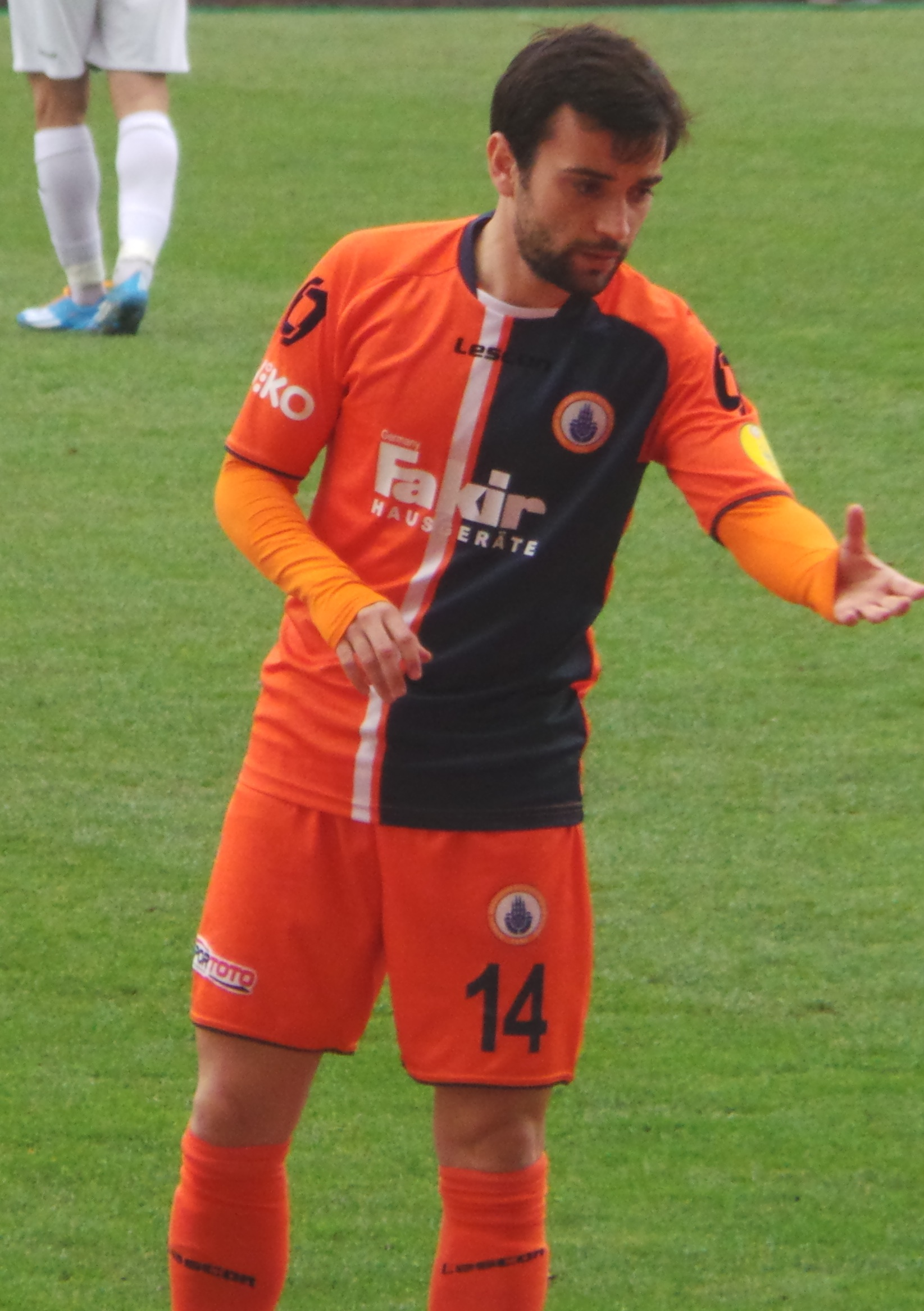 Ömer Can Sokullu